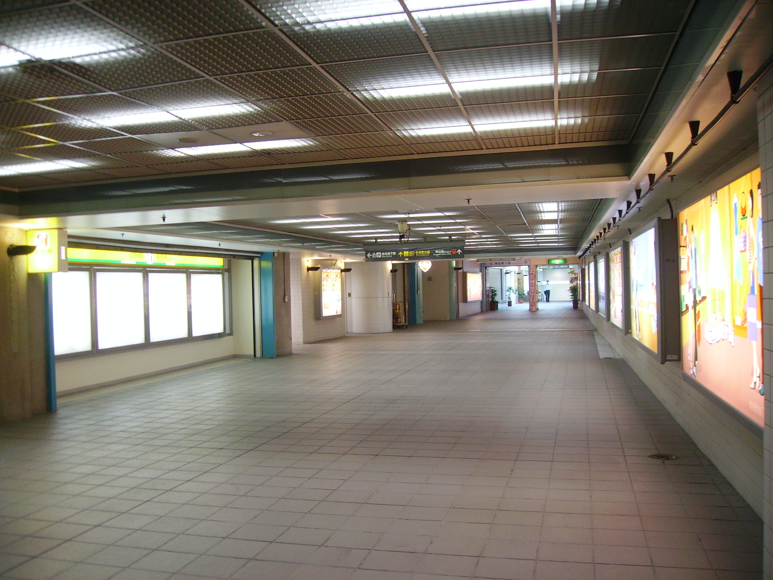 中山地下街往R1出口。